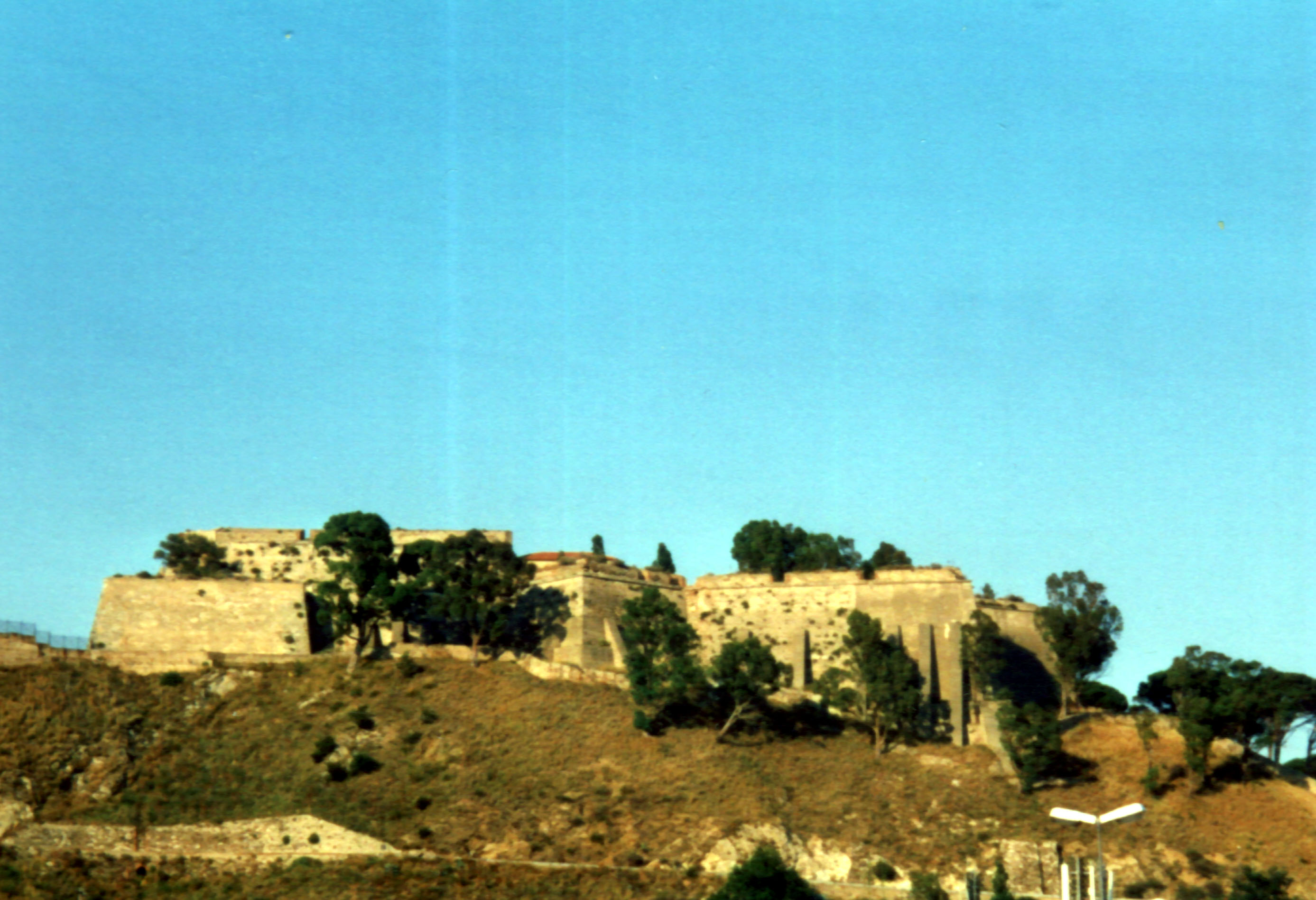 Forte Gonzaga a Messina